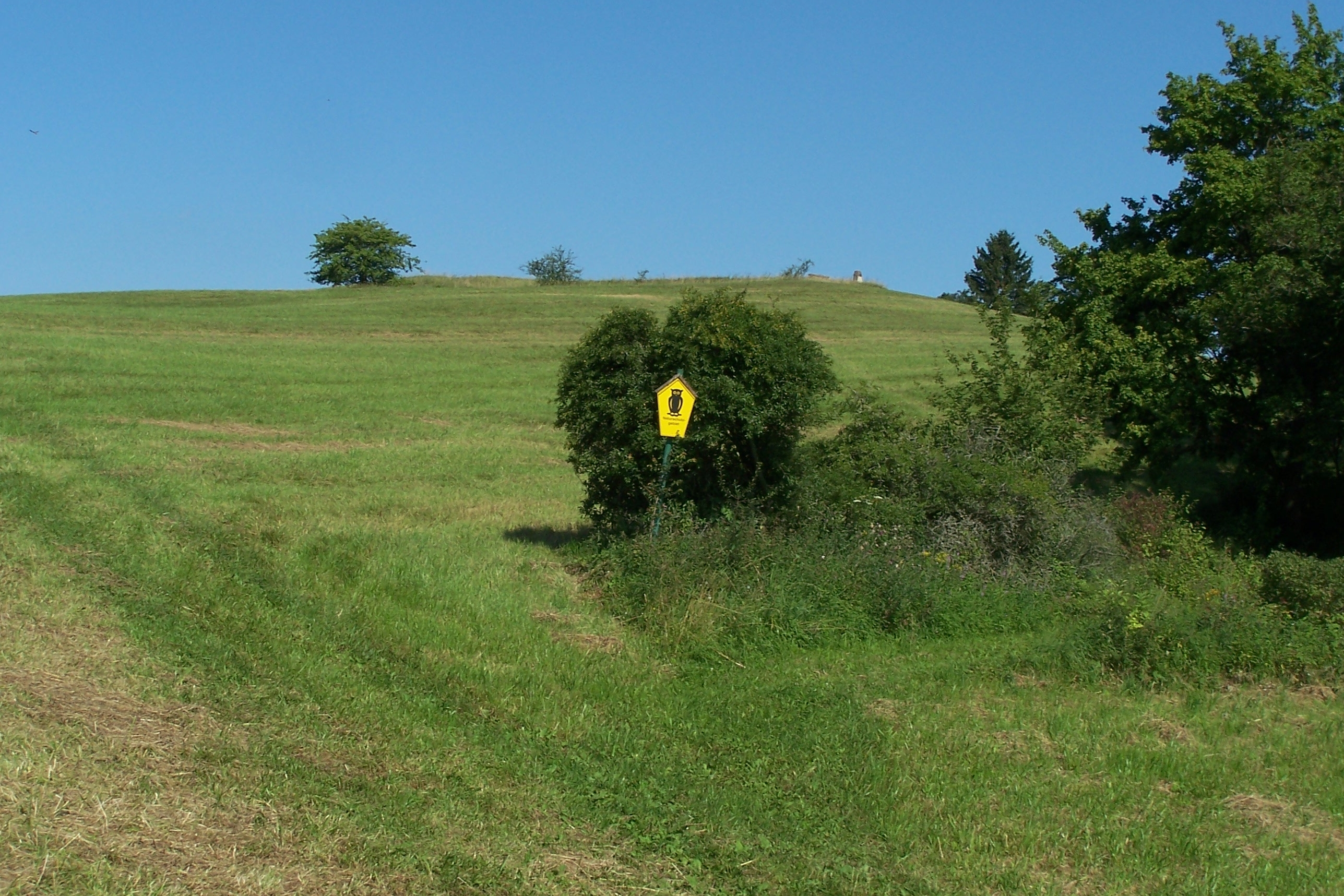 Bauwerke, Ansichten und Sehenswertes in Waldfisch